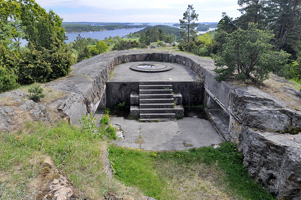 Sundås batteri i Stokke kommune